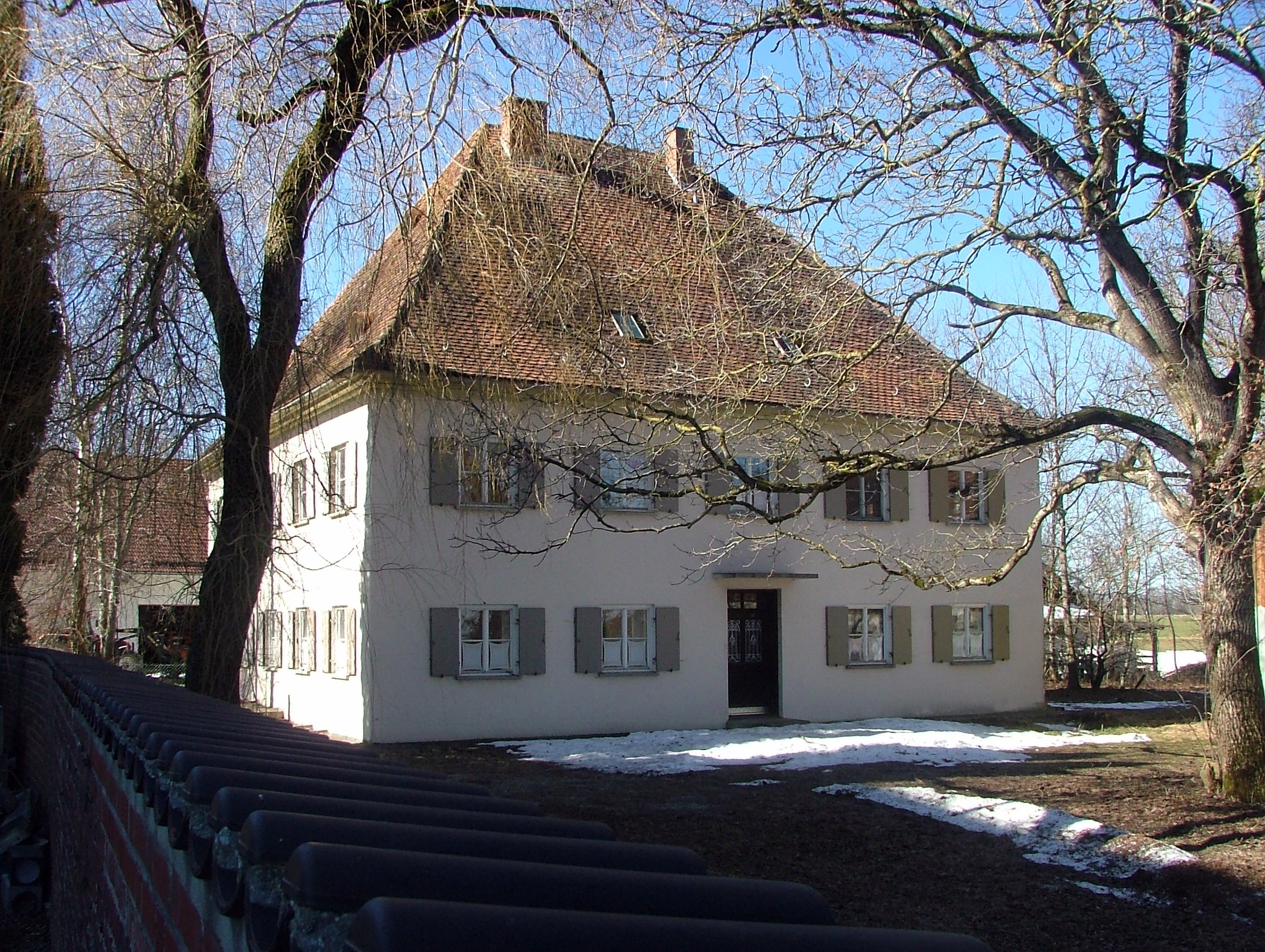 Pfarrhof Unteregg